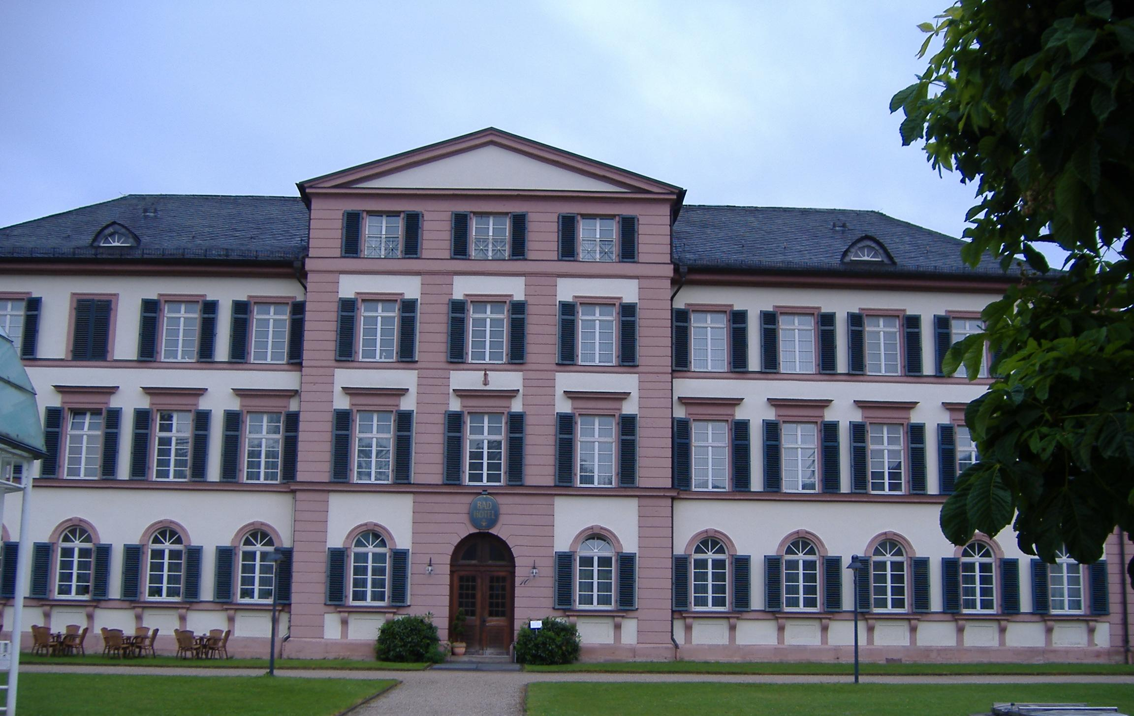 Badhotel Staatsbad Bad Brückenau